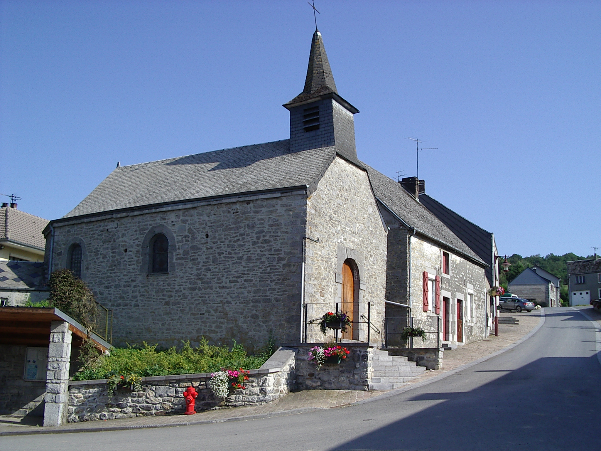 Eglise de Charnois, commune française, située dans le département des Ardennes et la région Champagne-Ardenne